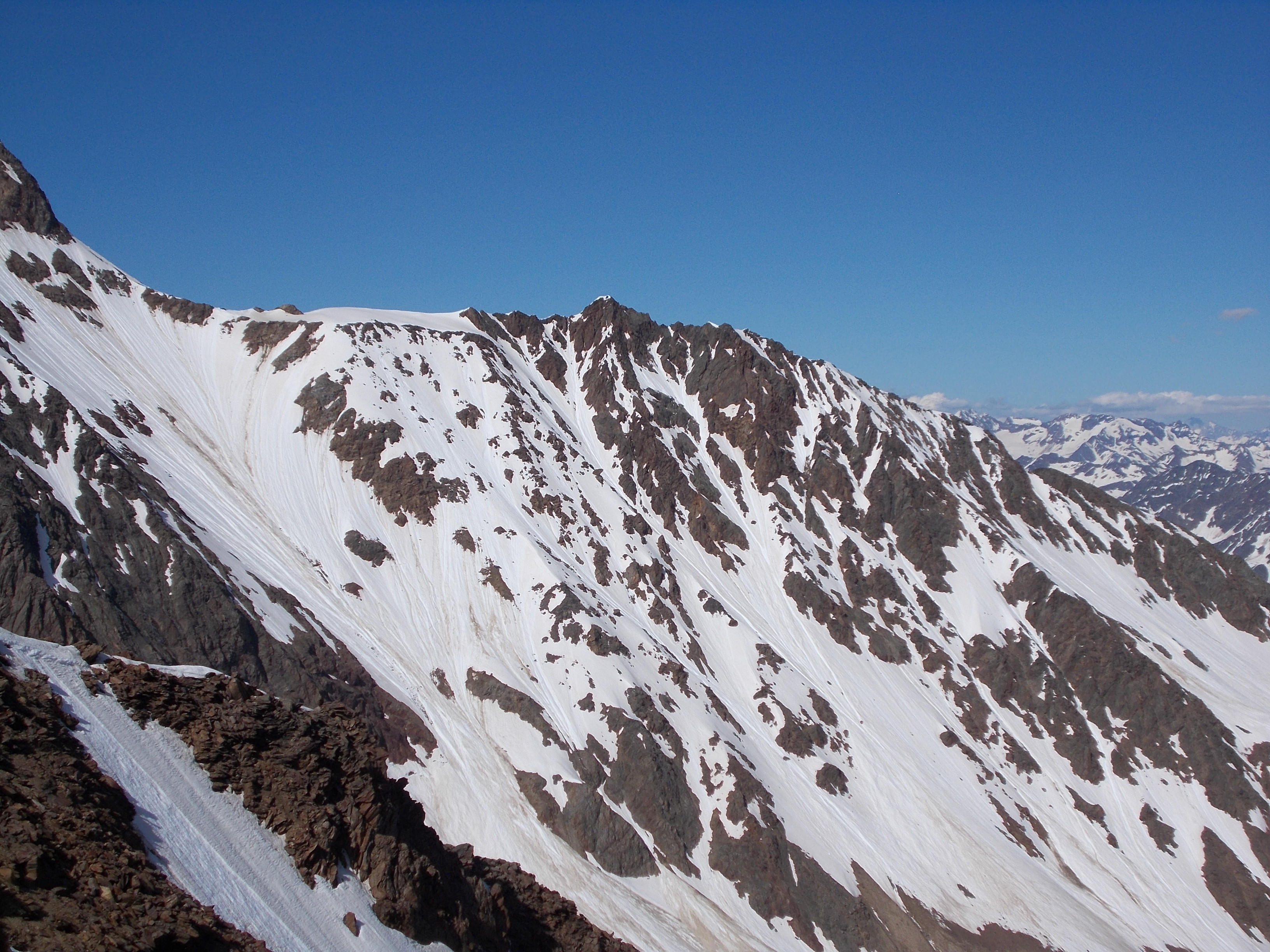 Ötztaler Urkund vom Vorderem Brochkogel aus gesehen